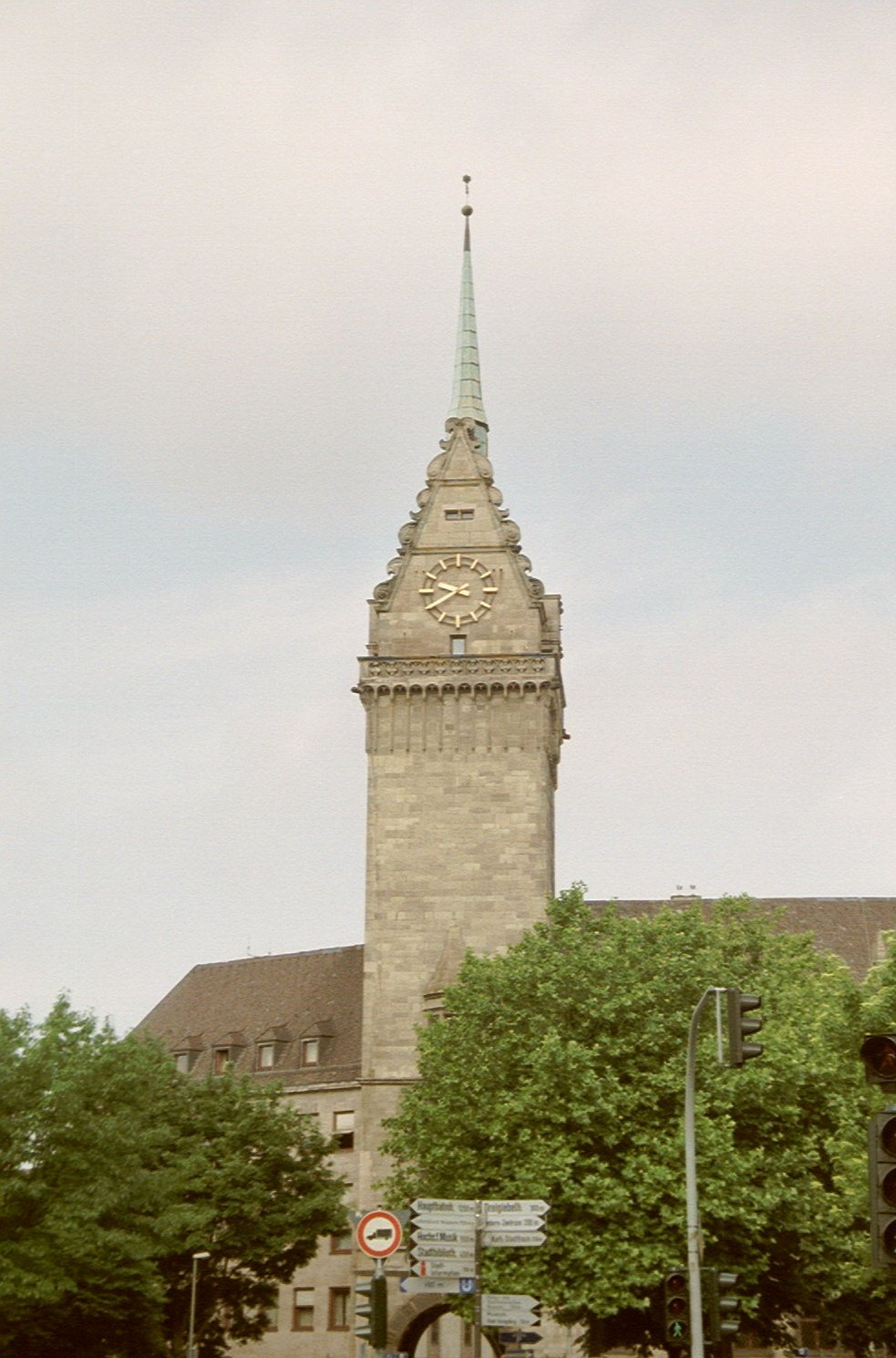 Duisburger Rathaus am Burgplatz